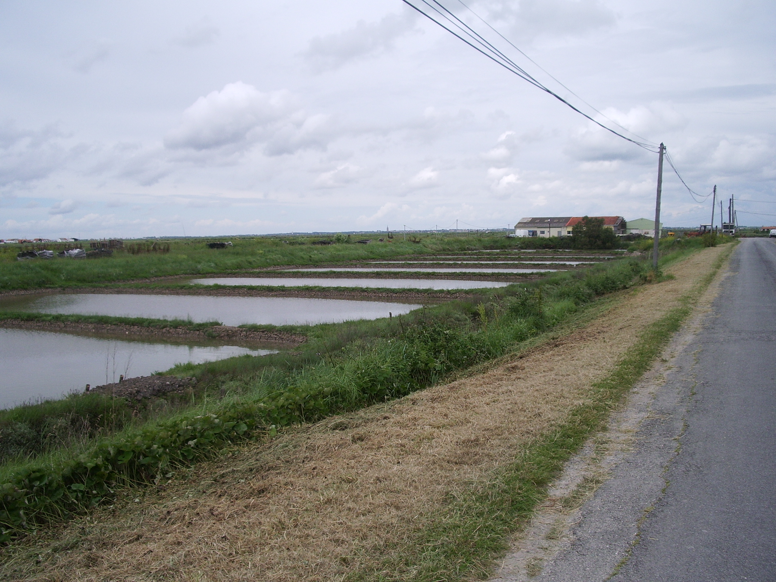 Claires du port ostréicole d'Orivol à Etaules, Charente-Maritime, France